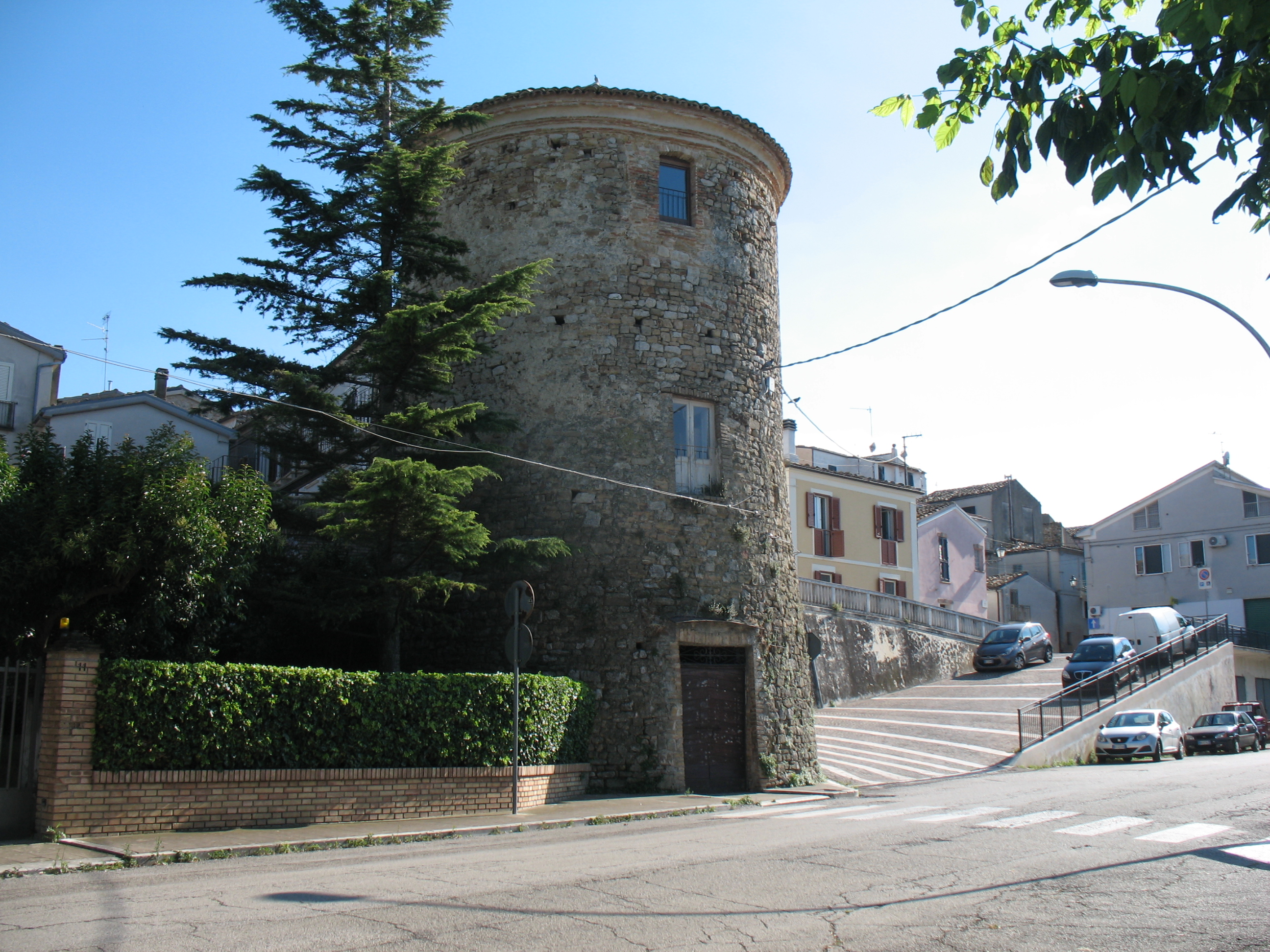 Una torre a pianta circolare nel paese di Alanno